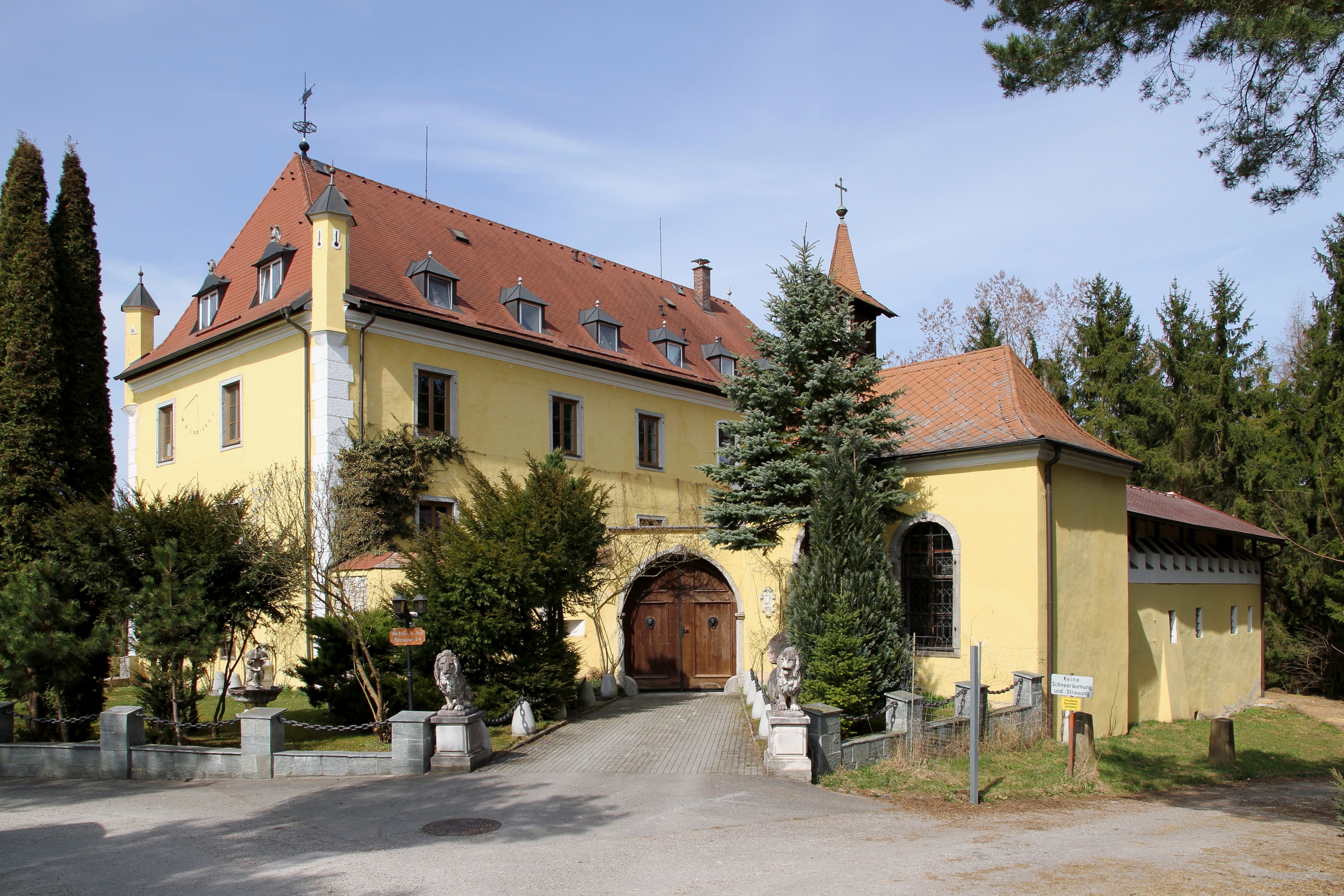 Schloss Au an der Traun in der oberösterreichischen Gemeinde Roitham. Ein kleiner rechteckiger Bau mit einer freistehenden Schloßkapelle aus dem Jahr um 1660.